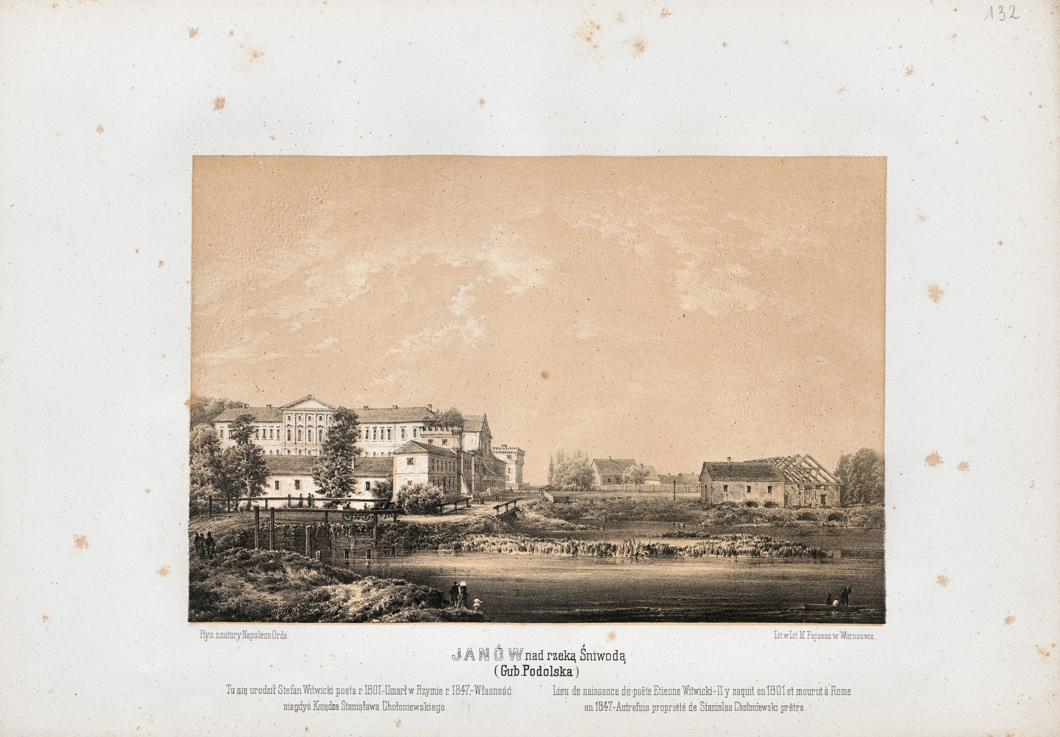 Іванів (Калинівський район Вінницької області) на гравюрі Наполеона Орди